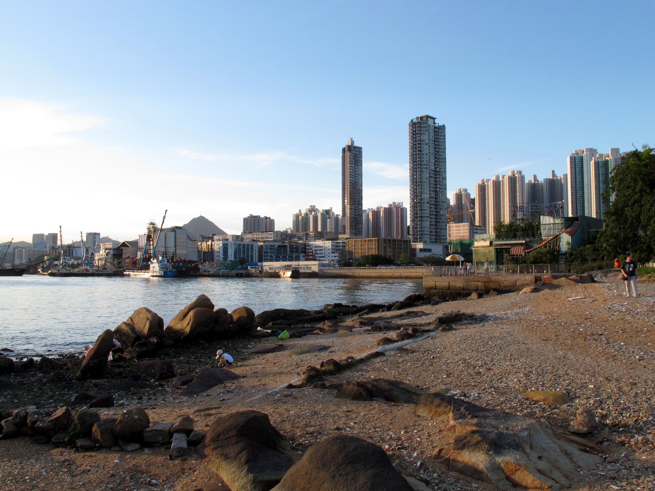 Yau Tong Dusk View